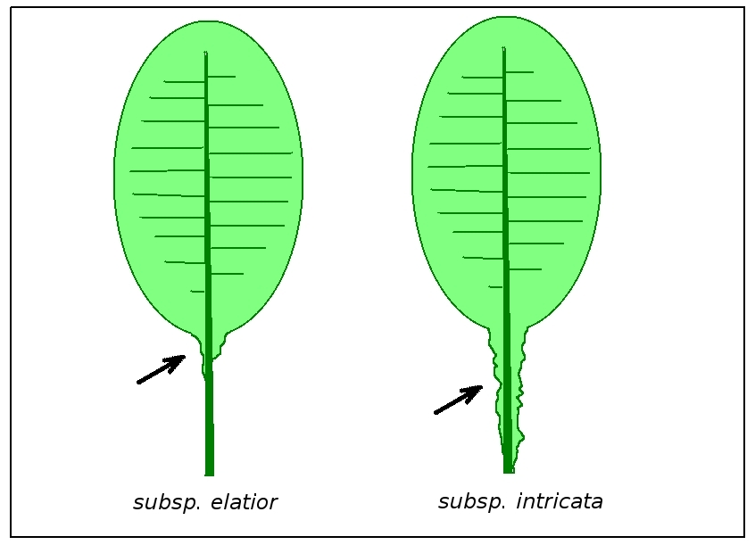 Primula elatior